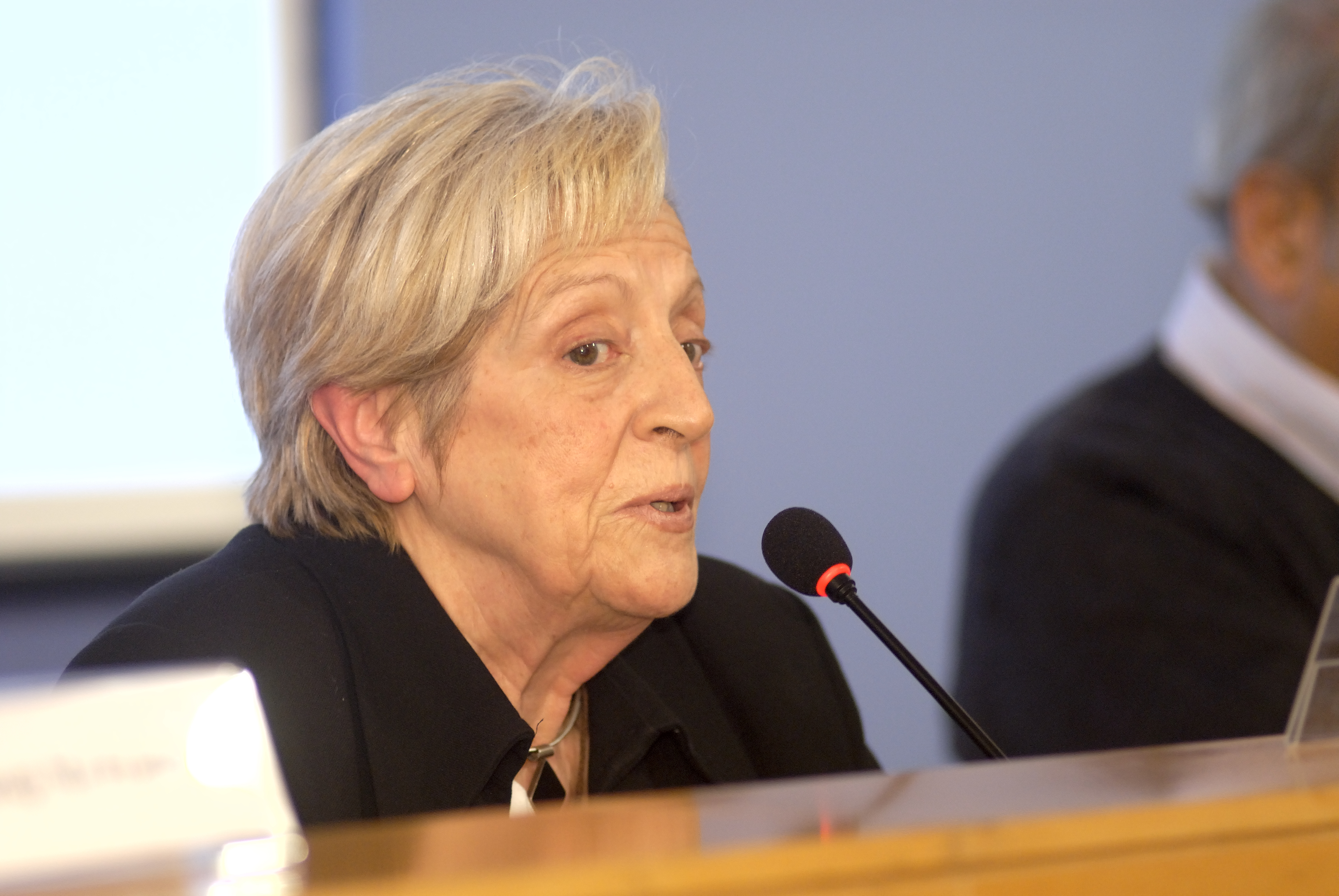 Laura Tremosa al MHC el 2008.